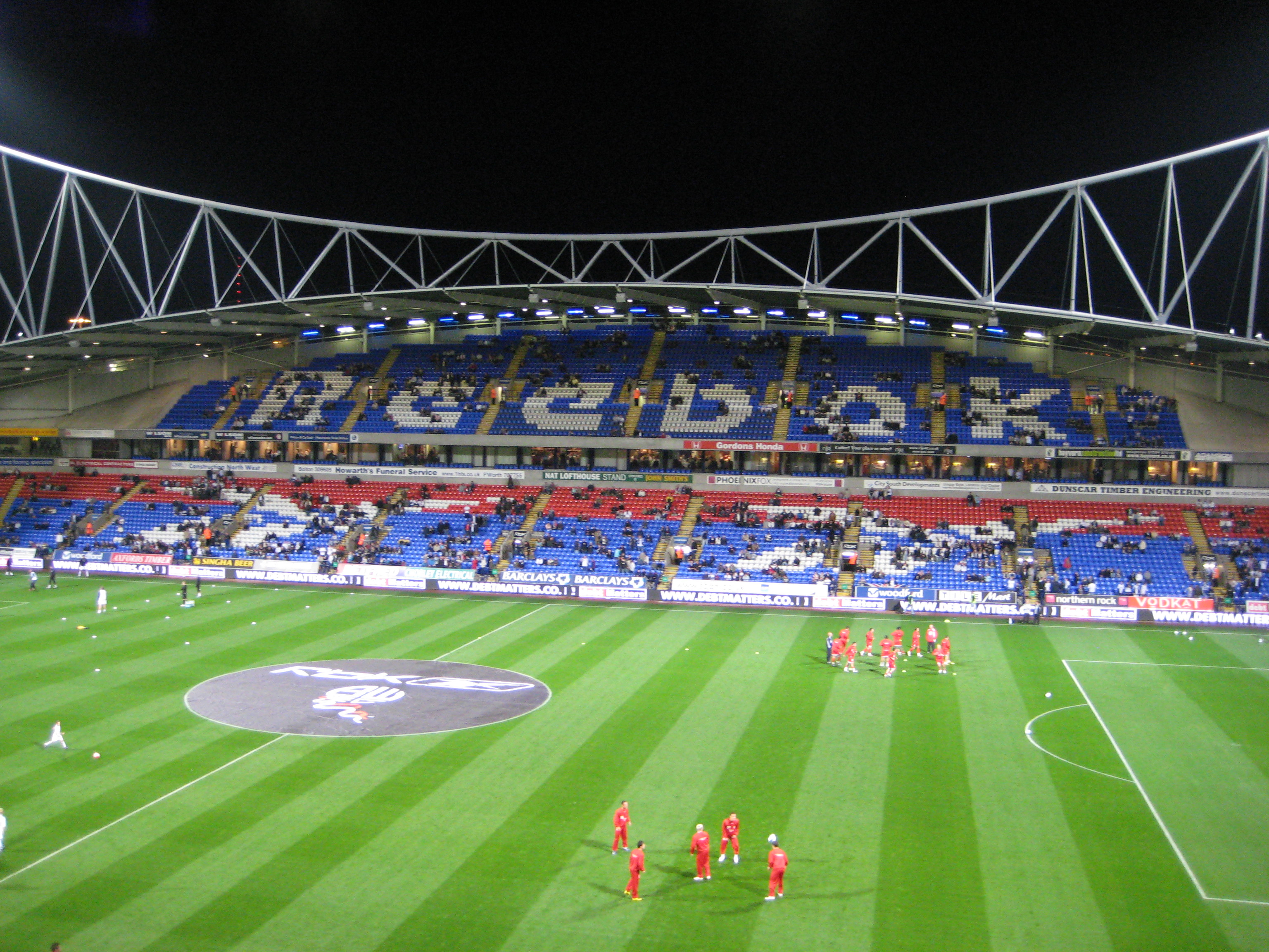 Reebok Stadium